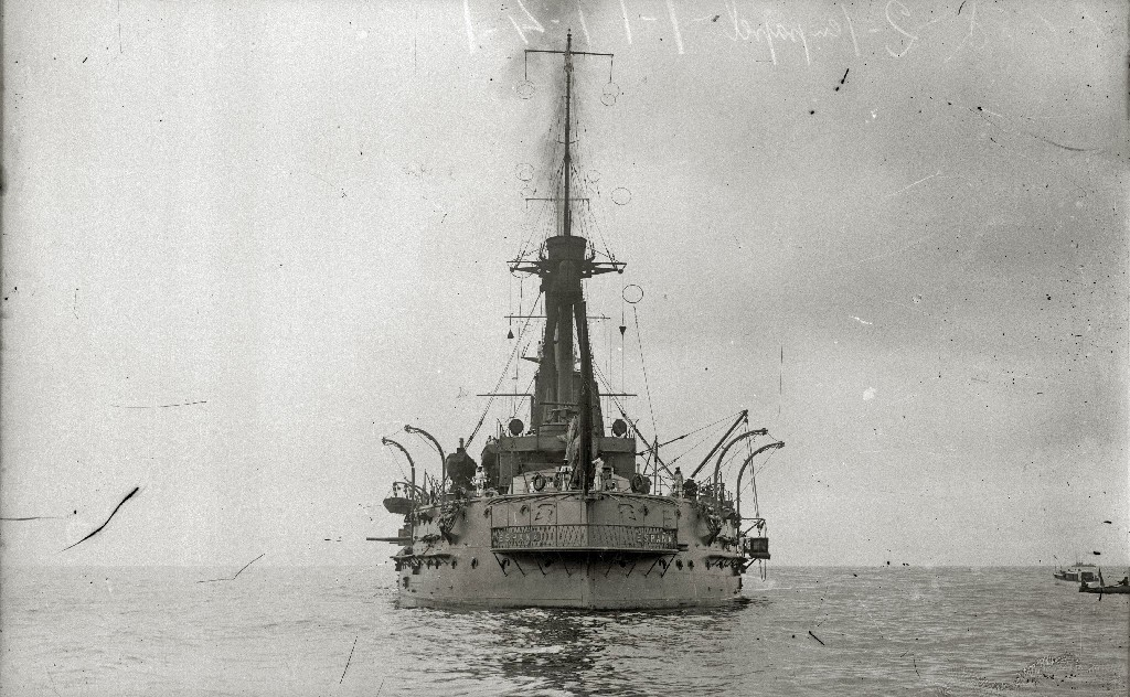 Le cuirassier España de l'Armada Espagnole, dans la baie de Passages de San Juan (Gipuzkoa), à destination de la guerre de l'Afrique en 1922. Vue de poupe.